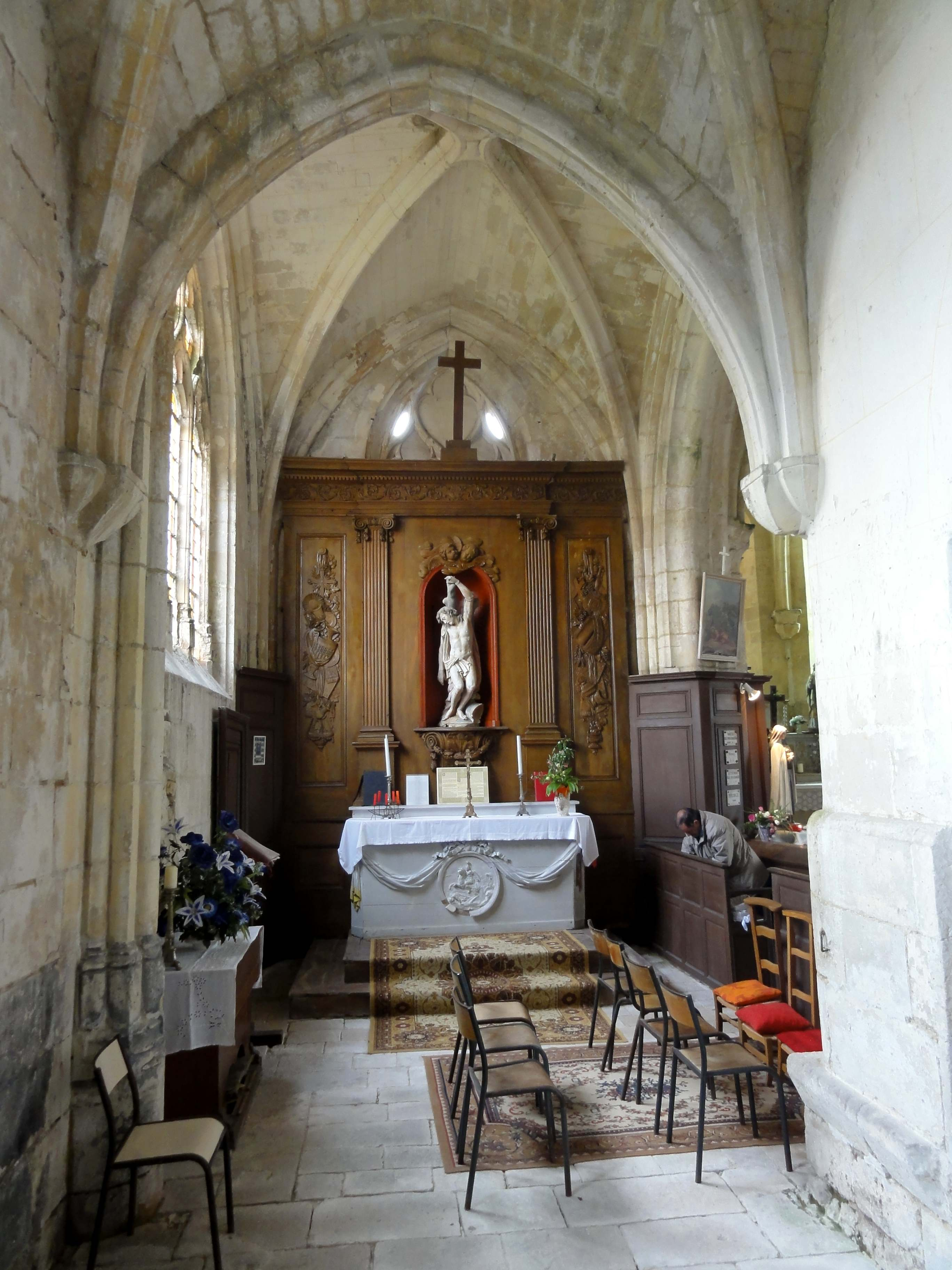 Intérieur de l'église - voir titre.